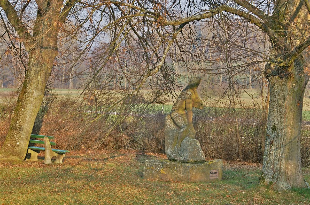 Erlkönig auf dem alten Friedhof